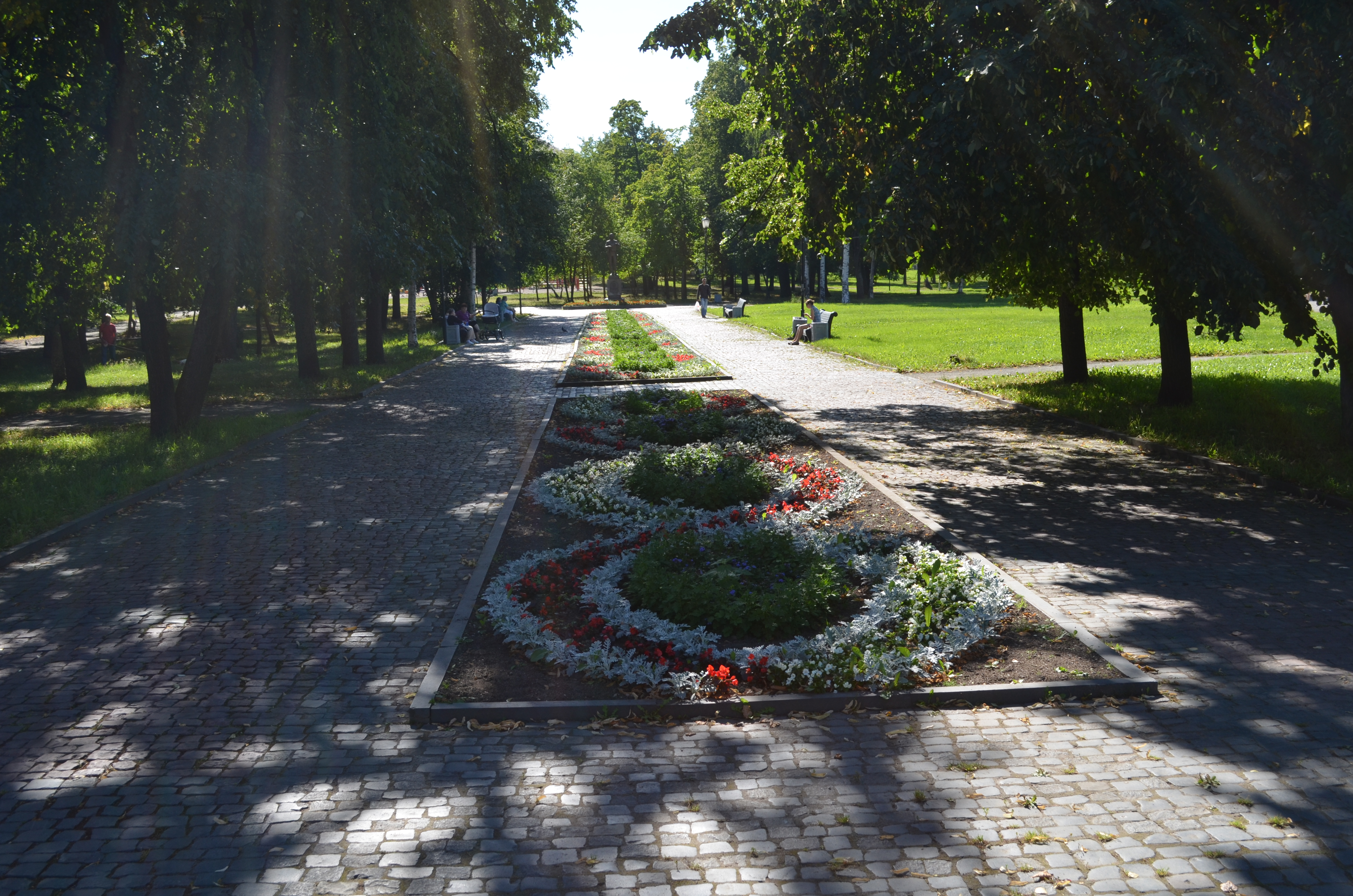 г. Петрозаводск. Губернаторский сад